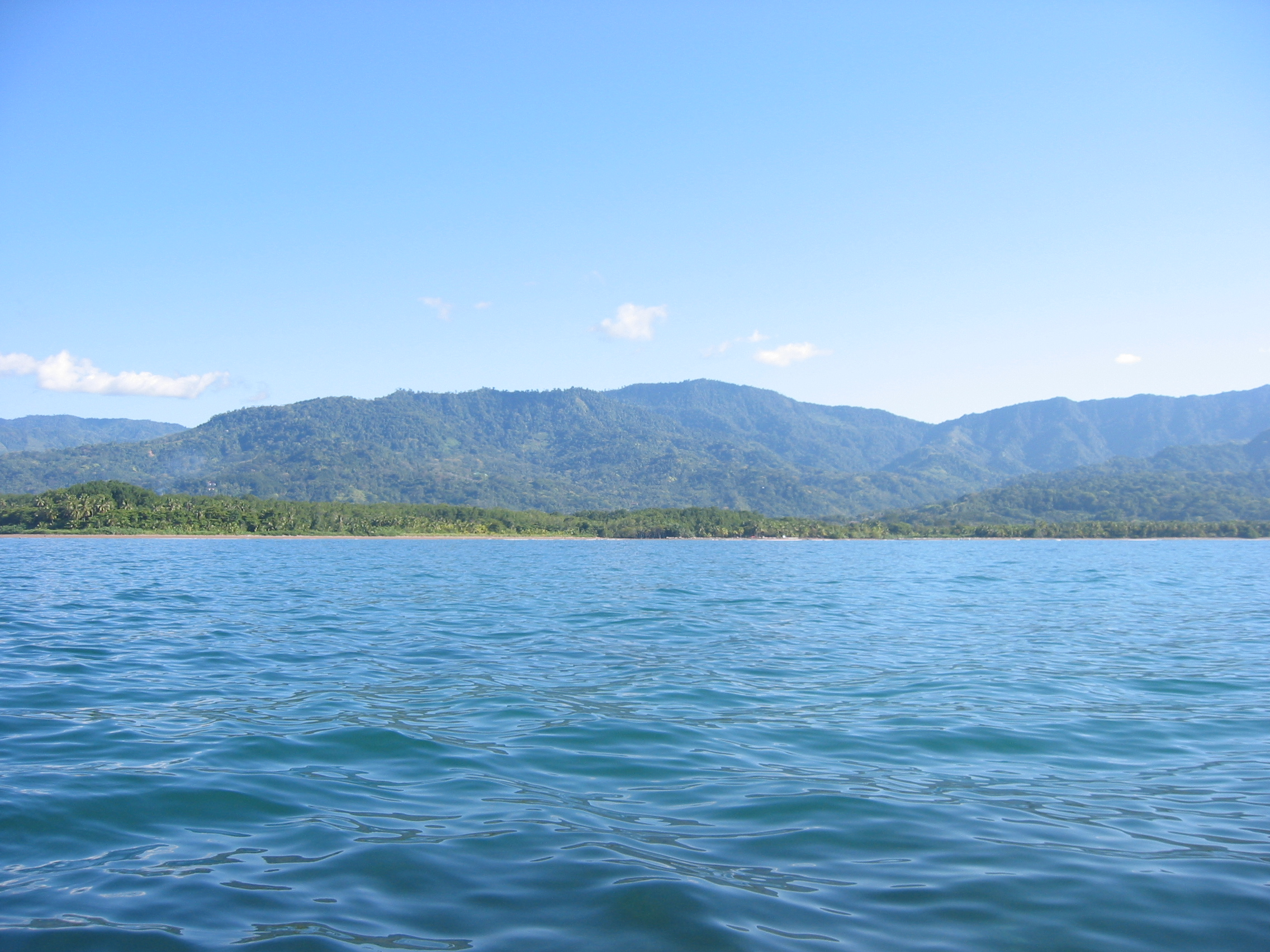 Costa del Pacífico costarricense vista desde el Parque Marino Ballena.